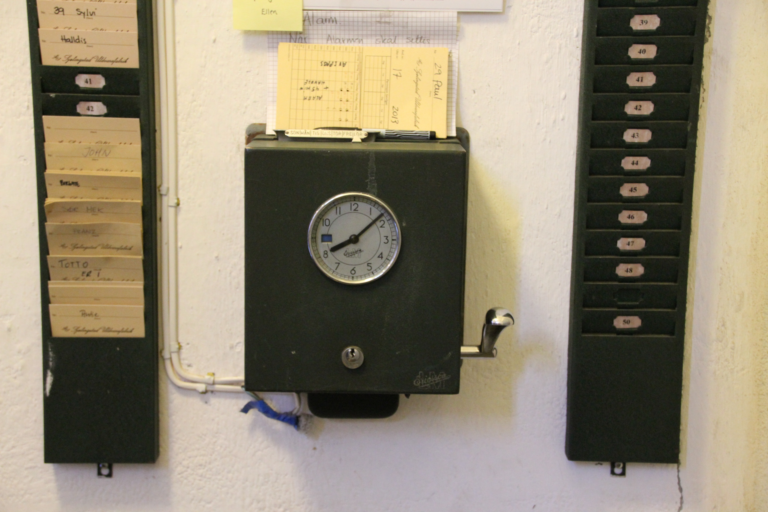 Bilde fra Sjøllingstad Uldvarefabrik, nær Mandal. Bildet viser stemplingsuret i spinneriet.